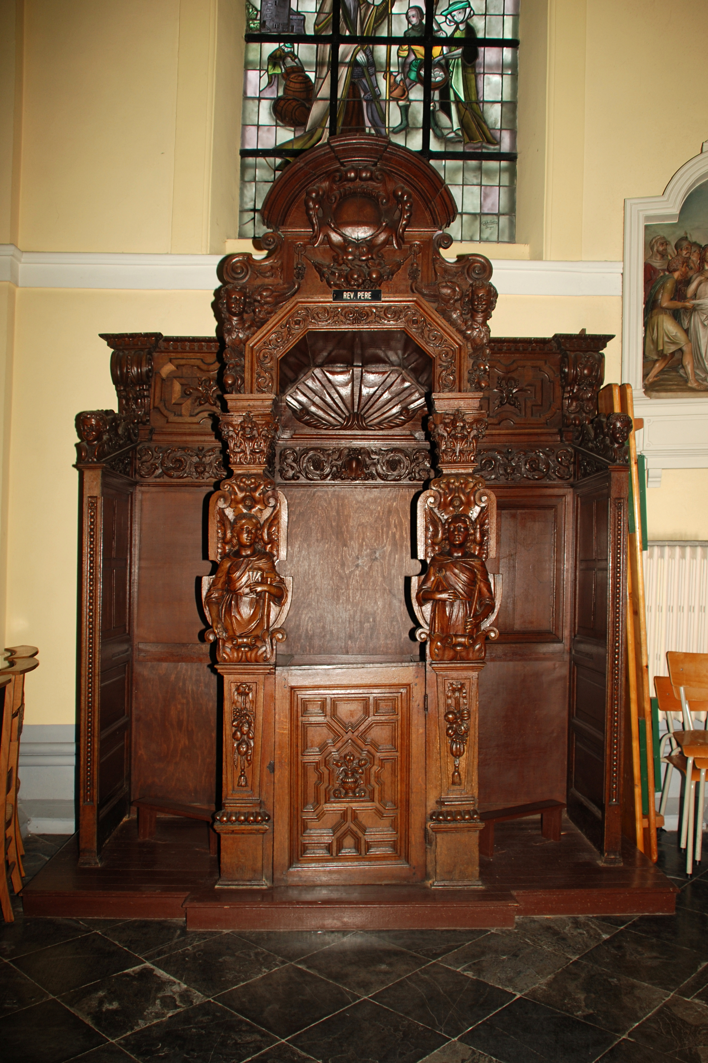 Belgique - Brabant wallon - Mont-Saint-Guibert - Église Saint-Guibert - Confessionnaux